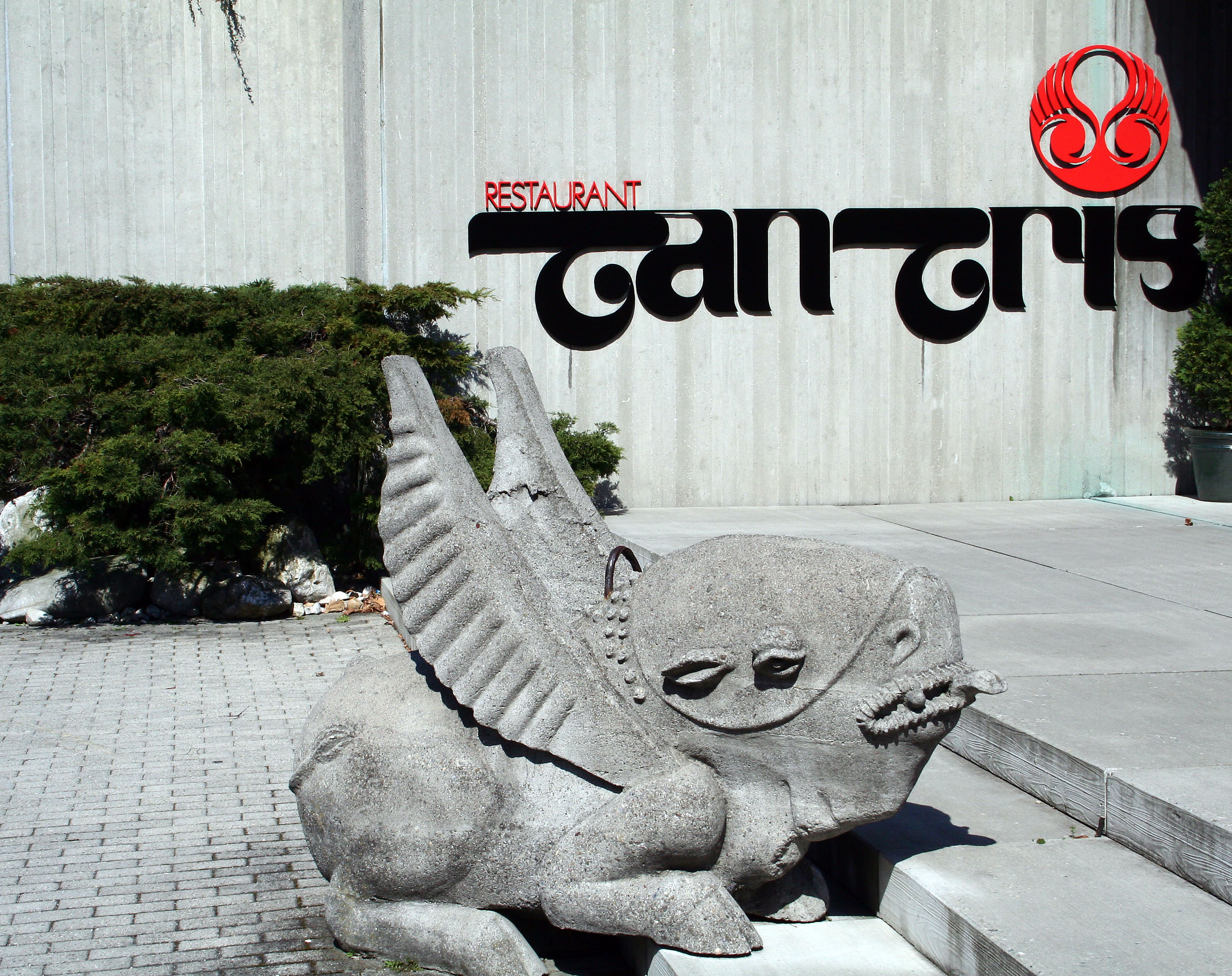 Fabeltier am Eingang des Restaurants Tantris in München.